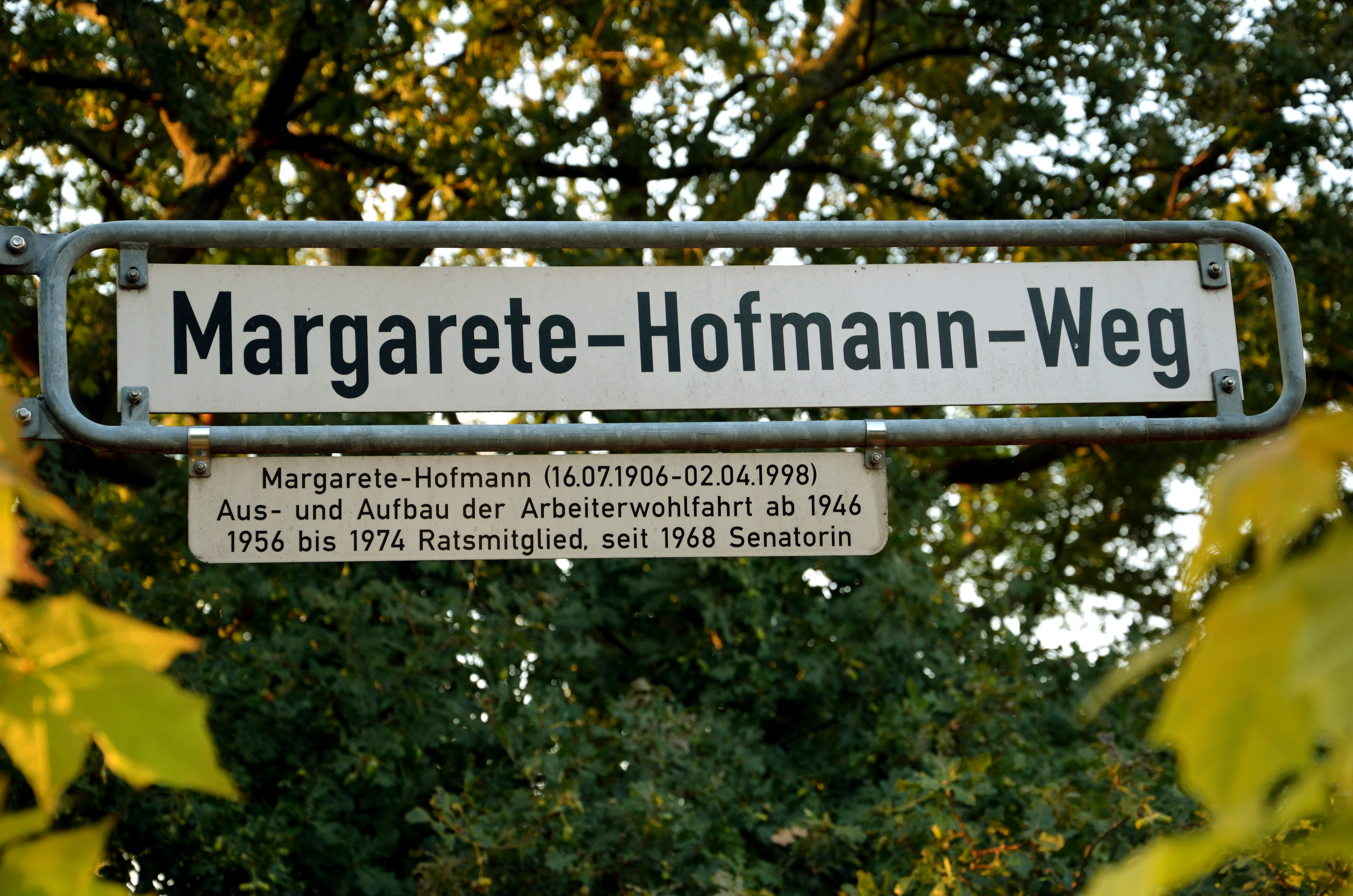 Straßenschild am Margarete-Hofmann-Weg in Hannover, Stadtteil Vahrenheide, mit Legendentafel: Margarete Hofmann (16. 07. 1906 - 02. 04. 1998), Aus- und Aufbau der Arbeiterwohlfahrt ab 1946, 1956 bis 1974 Ratsmitglied, seit 1968 Senatorin...